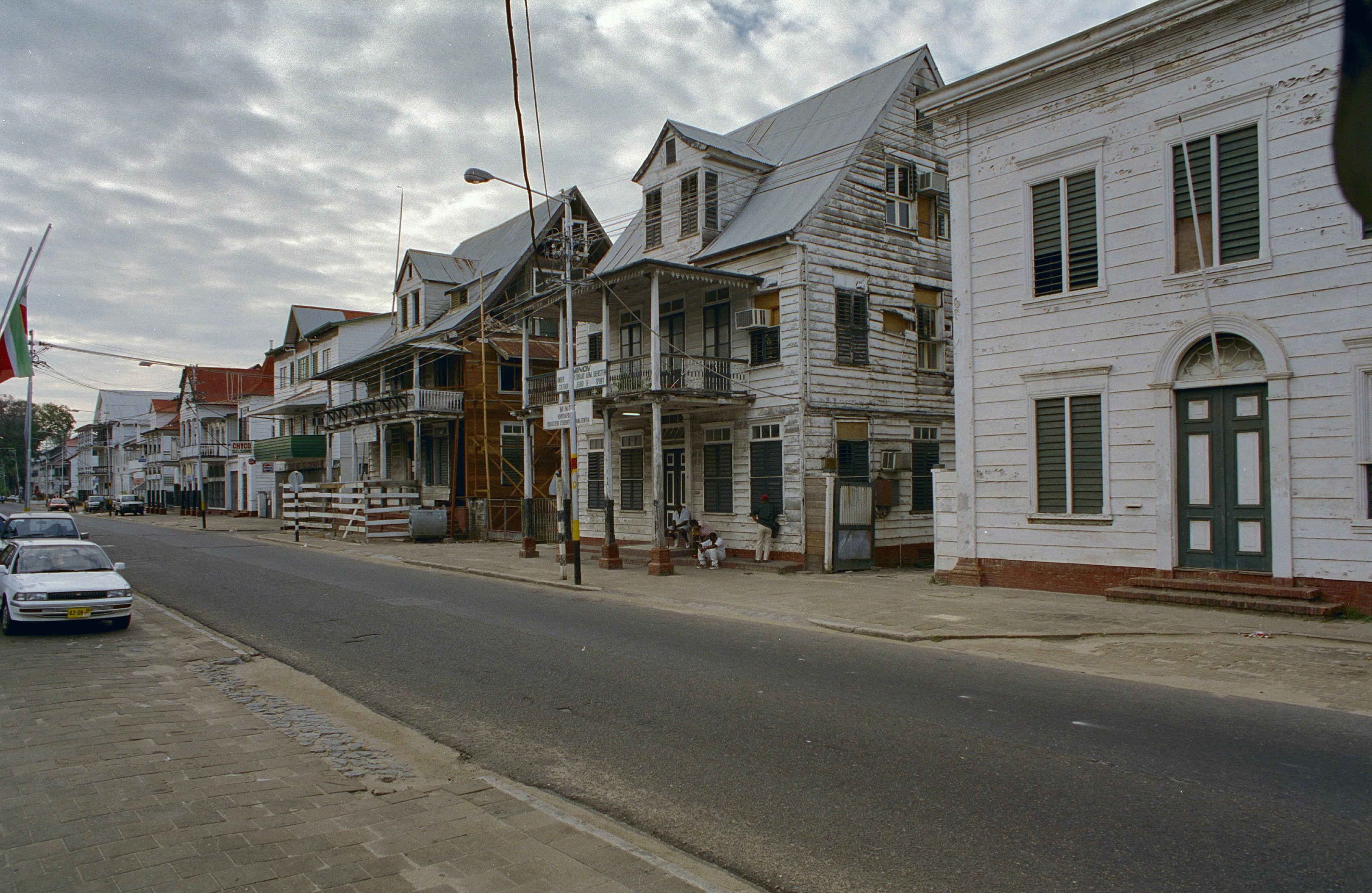 Koloniale geschiedenis: Overzicht (opmerking: Suriname Reis Loek Tangel)